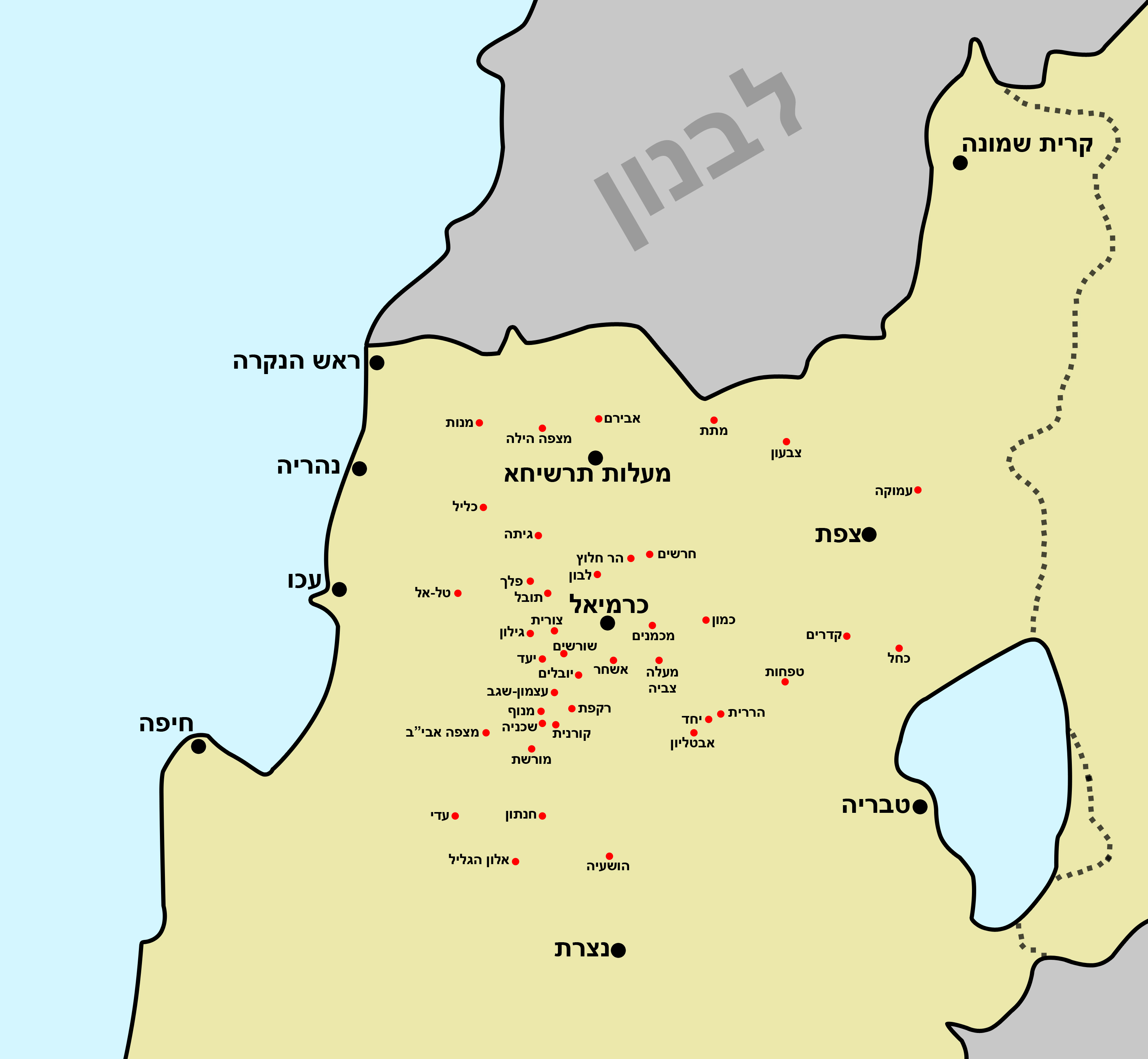 מפת ישובי תכנית המצפים בגליל